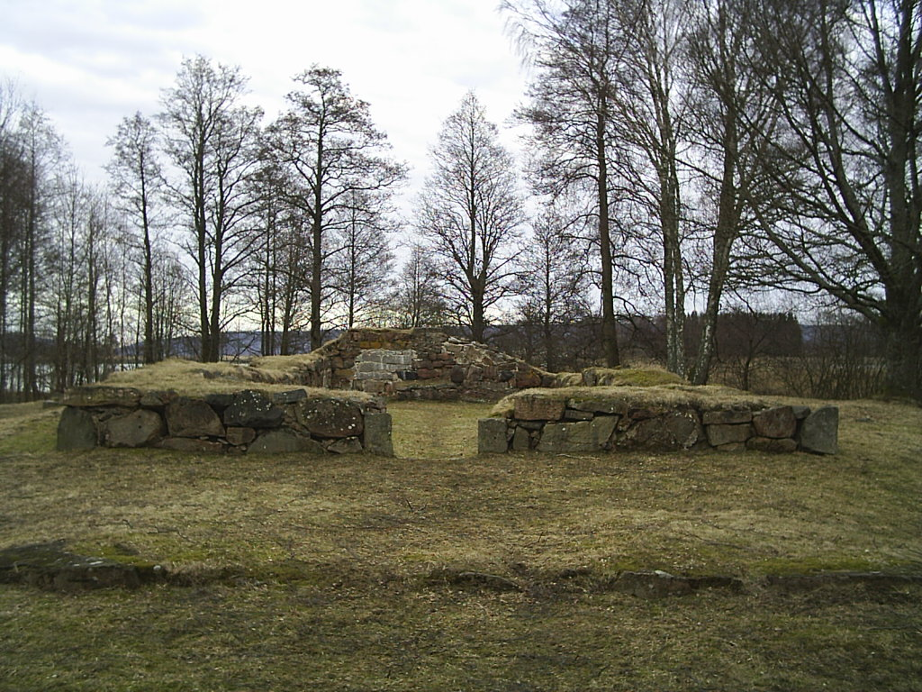 Naglums kyrkoruin (RAÄ-nummer Vänersborg 73:2) i Väne härad och Vänersborgs kommun. Fotograf:Tubaist